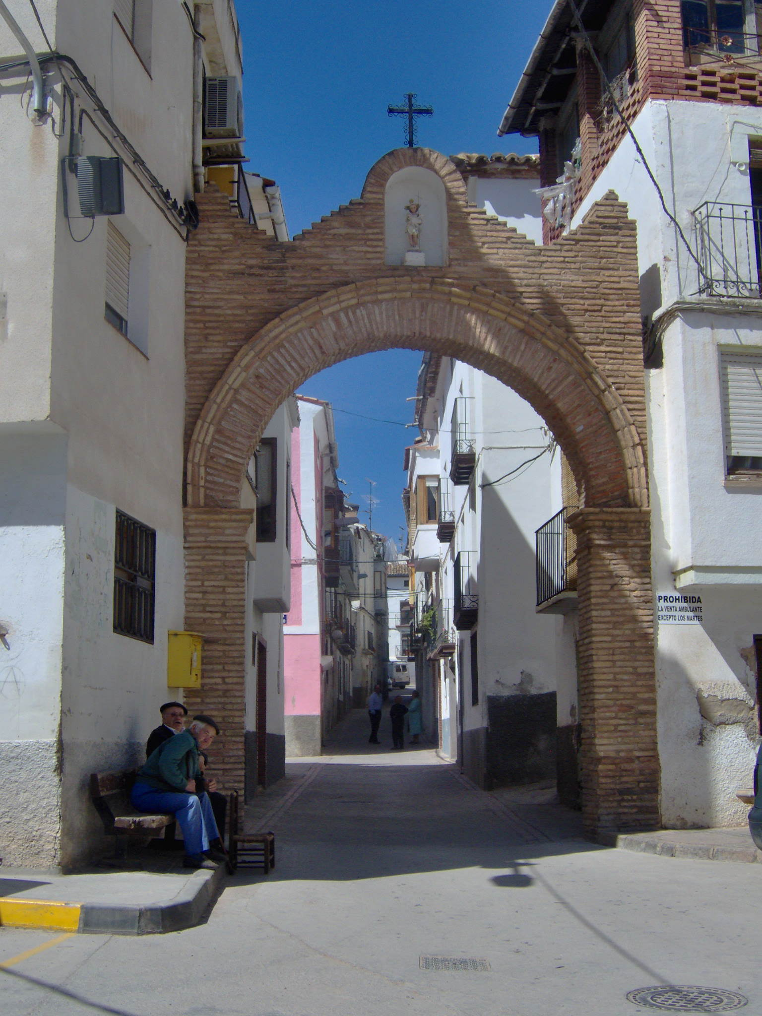 Arco de la Villa, en Arándiga, Zaragoza.